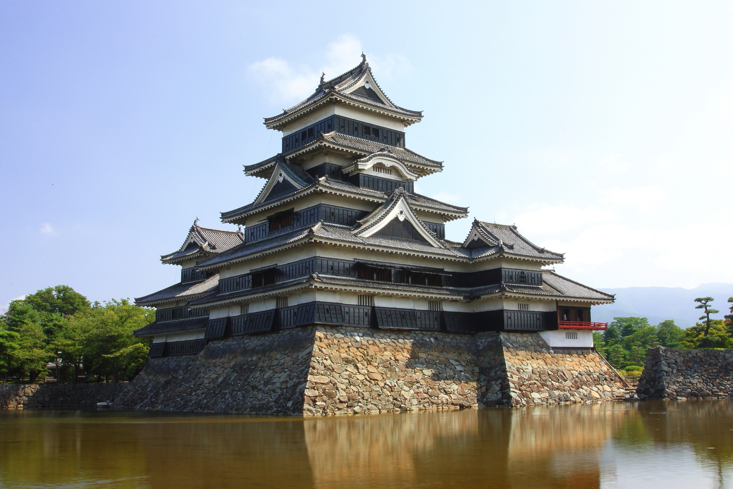 松本城天守（松本市丸の内、2009年（平成21年）8月）